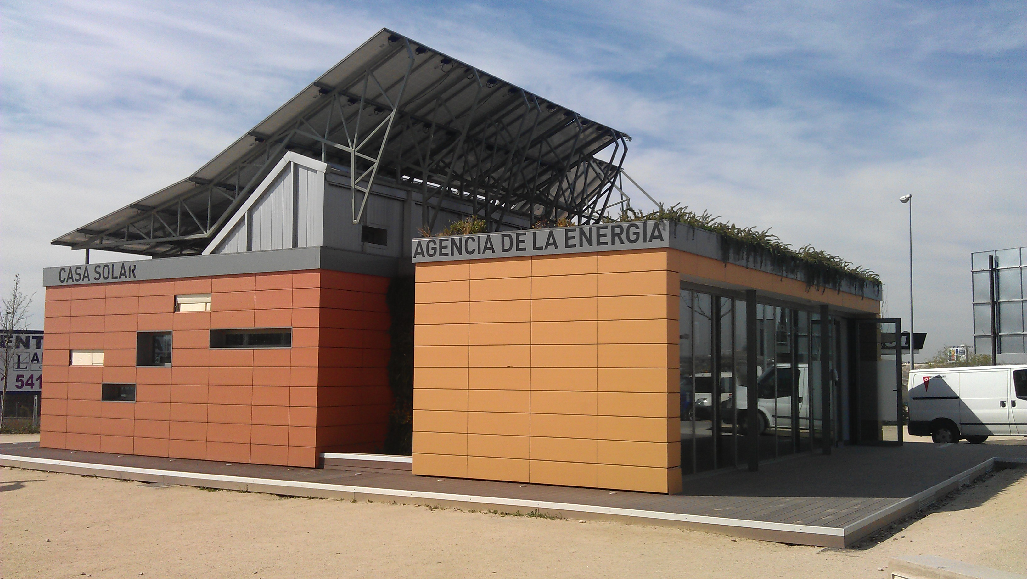 Agencia de la Energía municipal de Rivas-Vaciamadrid, ubicada en la Casa Solar.